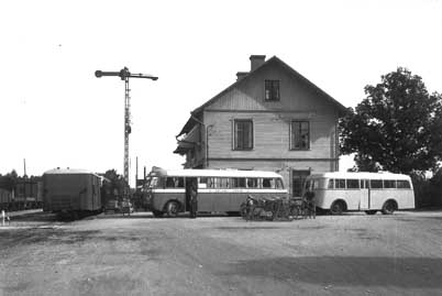 Tvenne bussar och rälsbusståg vid Klintehamns station.